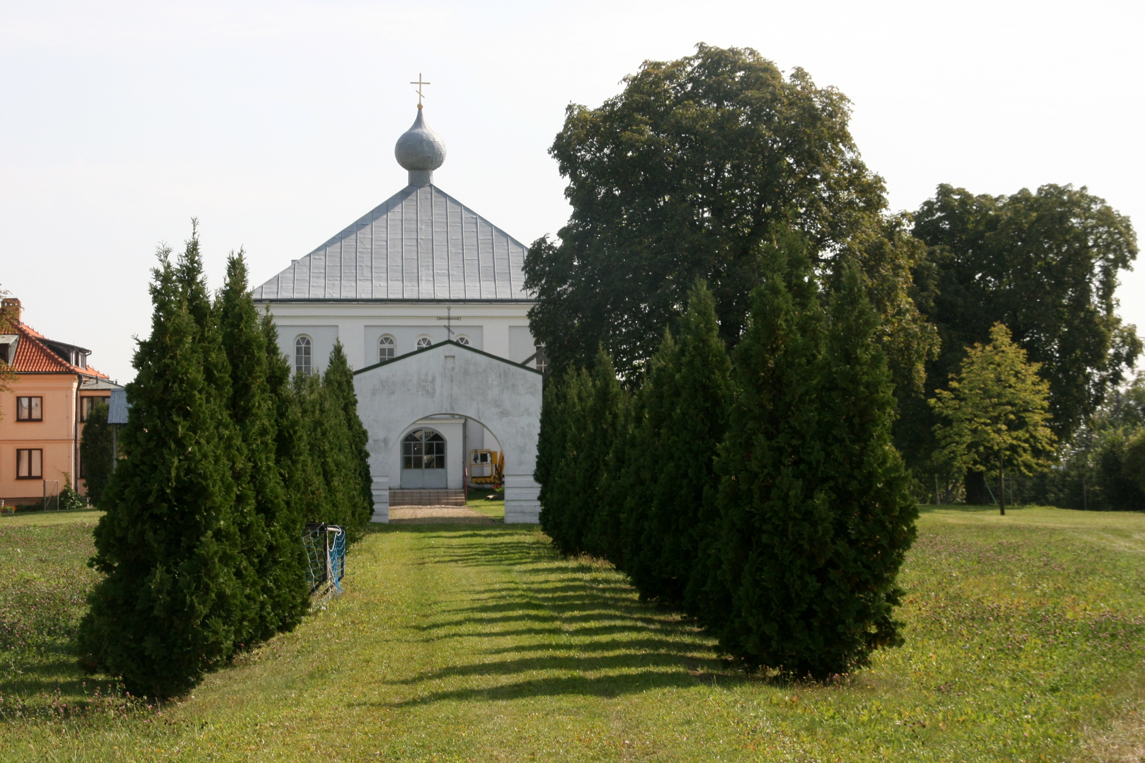 Stanisławowo - Cerkiew św. Aleksandry, poł. XIX.